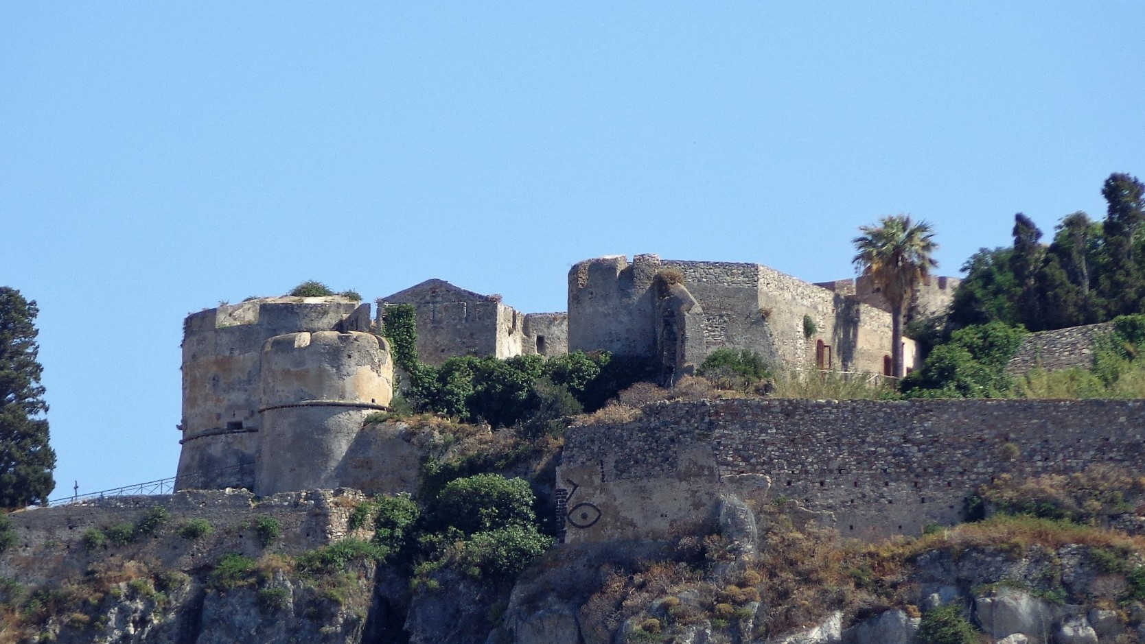 castello di Milazzo This is a photo of a monument which is part of cultural heritage of Italy.